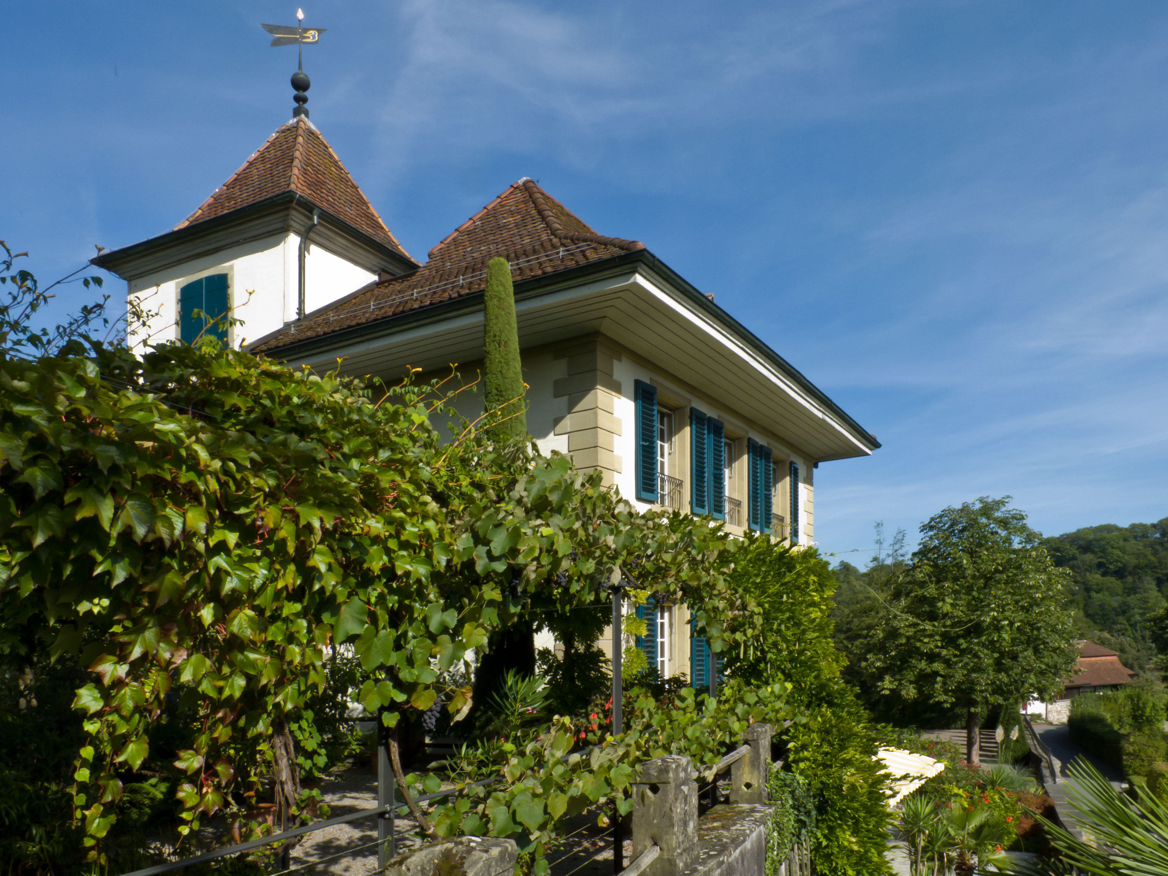 Südseitiger Anbau von Schloss Bremgarten, Aareseite.